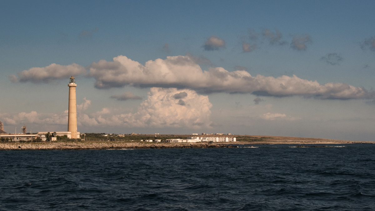 isole egadi sicily boboviel favignana marettimo levanzo